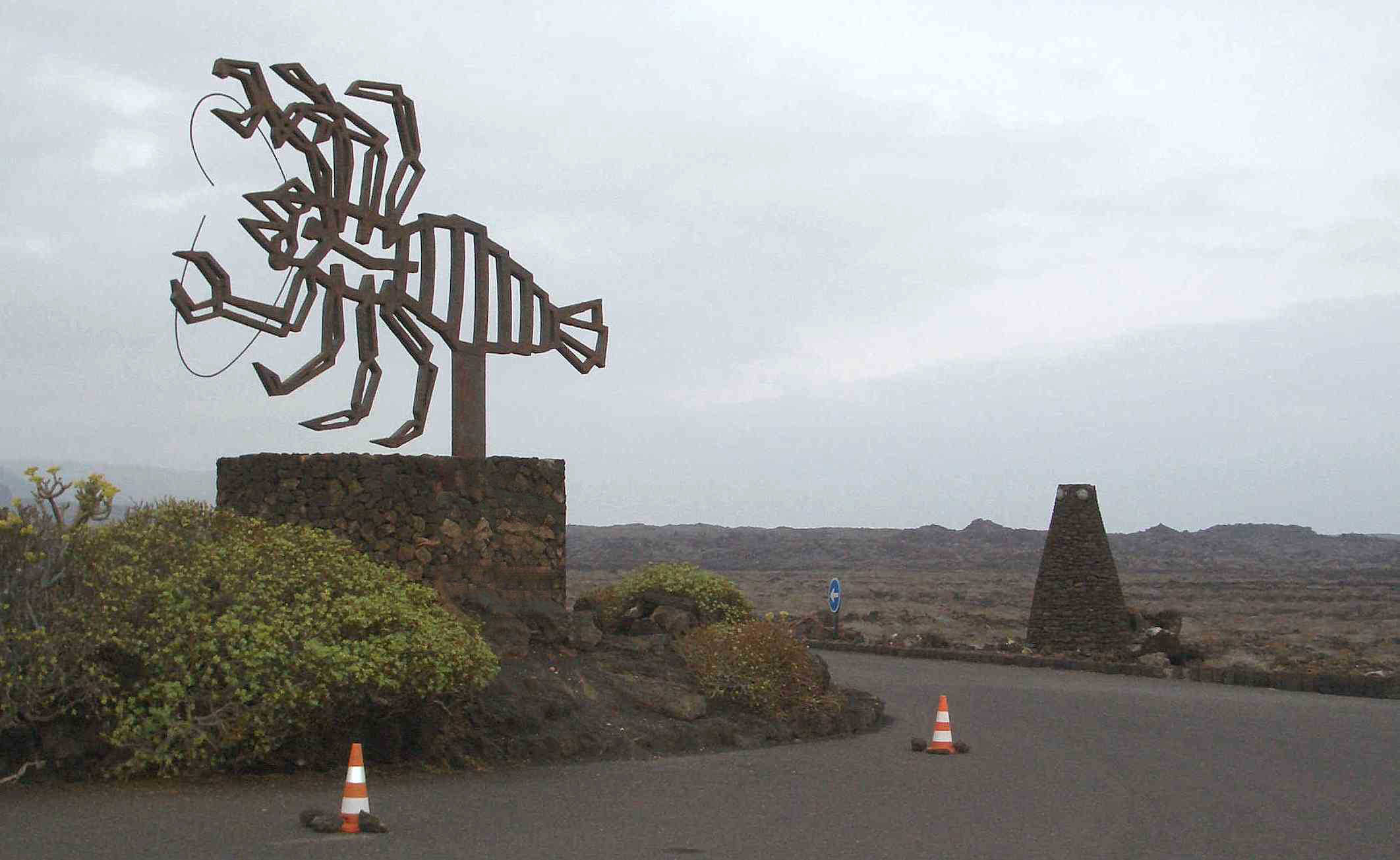 Das Wahrzeichen des Jameos del Agua - der Krebs